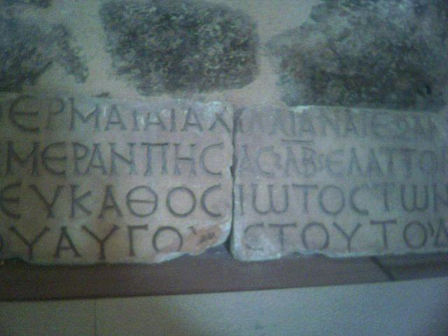 Iscrizione Greca